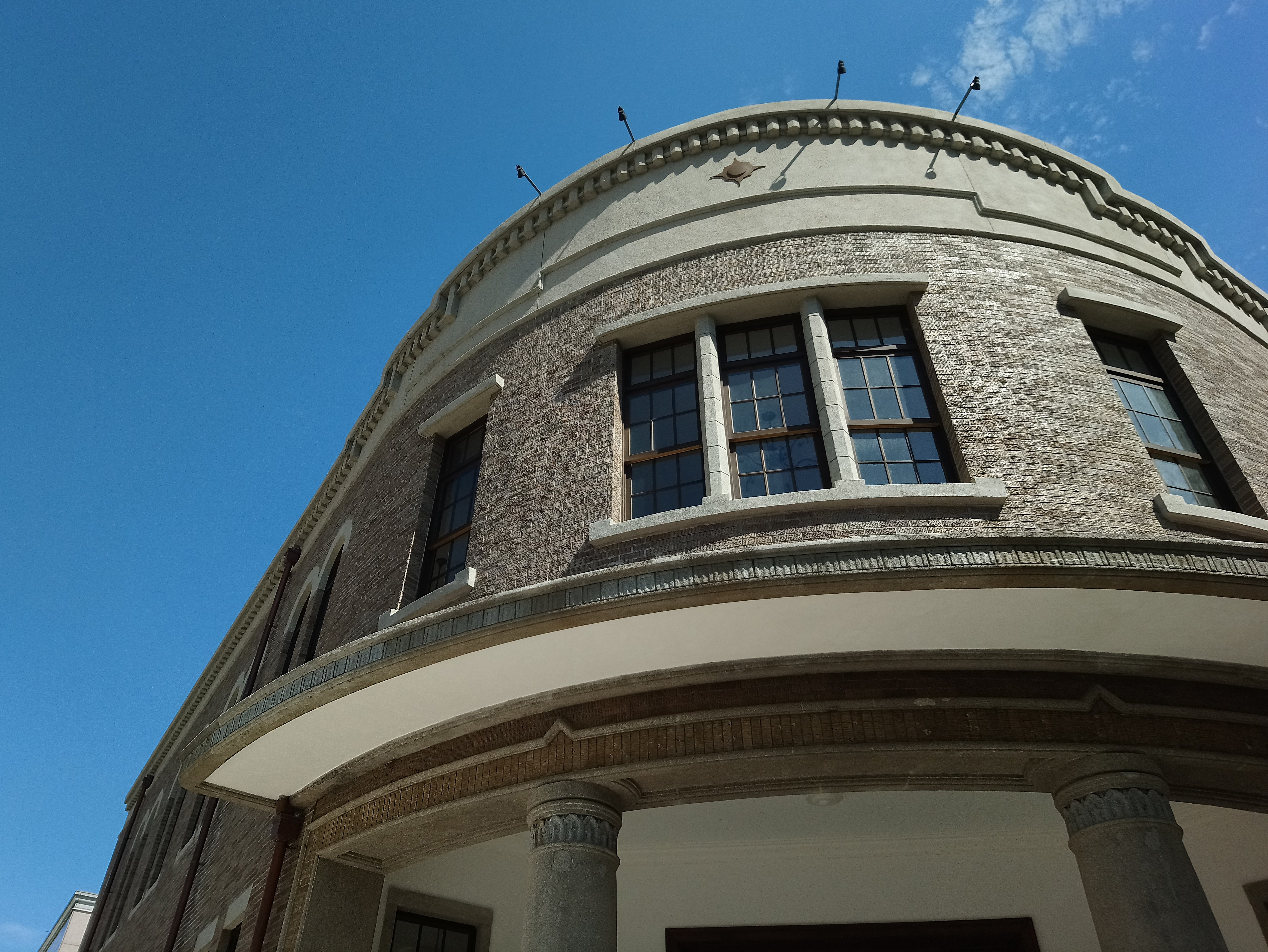 臺北北警察署轉角處近景,臺北市大同區建成次分區雙連里